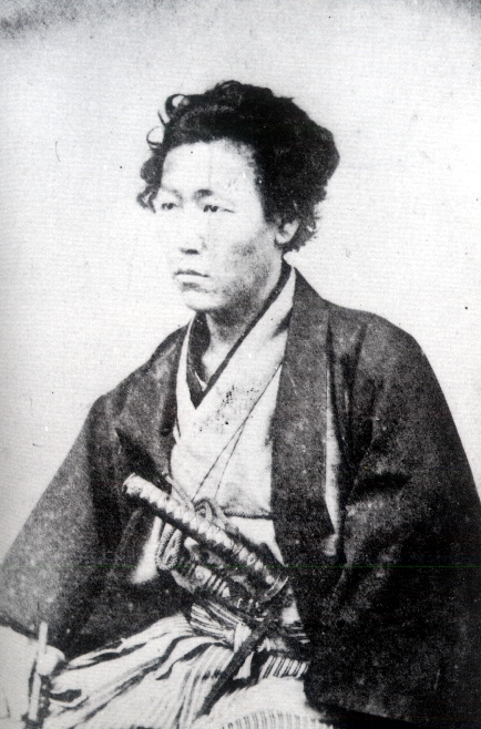 前原一誠 Maebara Issei.